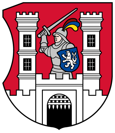 Heraldický znak města